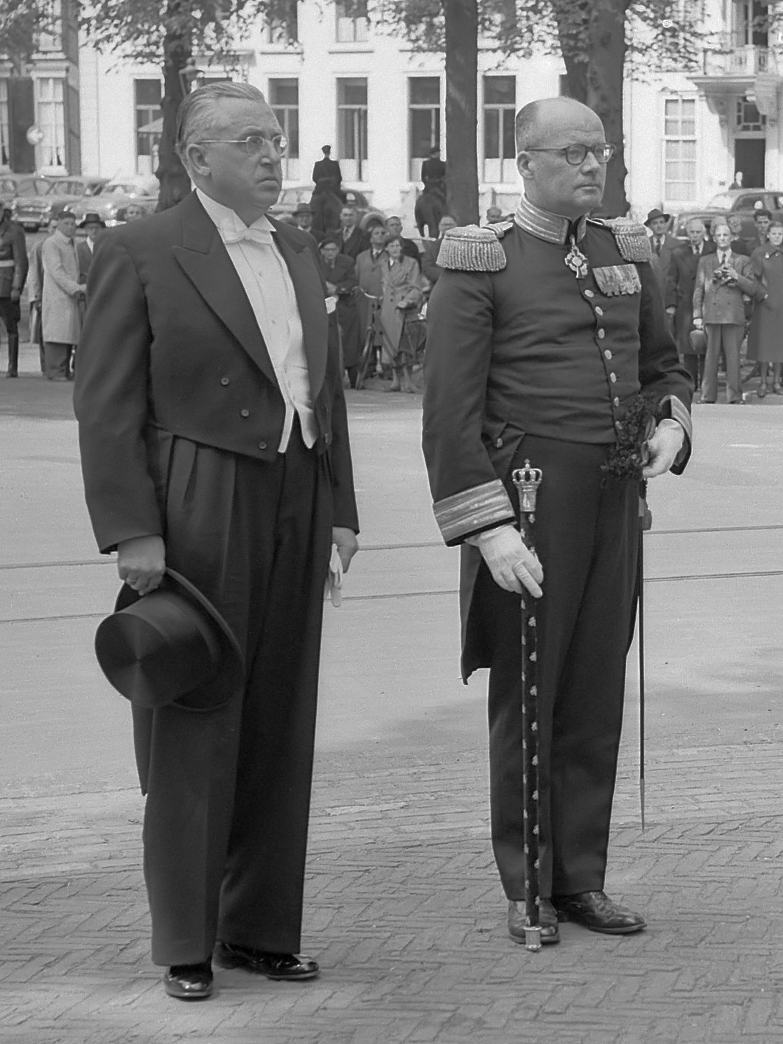 Nieuwe West-Duitse Ambassadeur Dr. H. Mühlenfeld (links), biedt zijn geloofsbrieven aan koningin Juliana aan 12 mei 1953